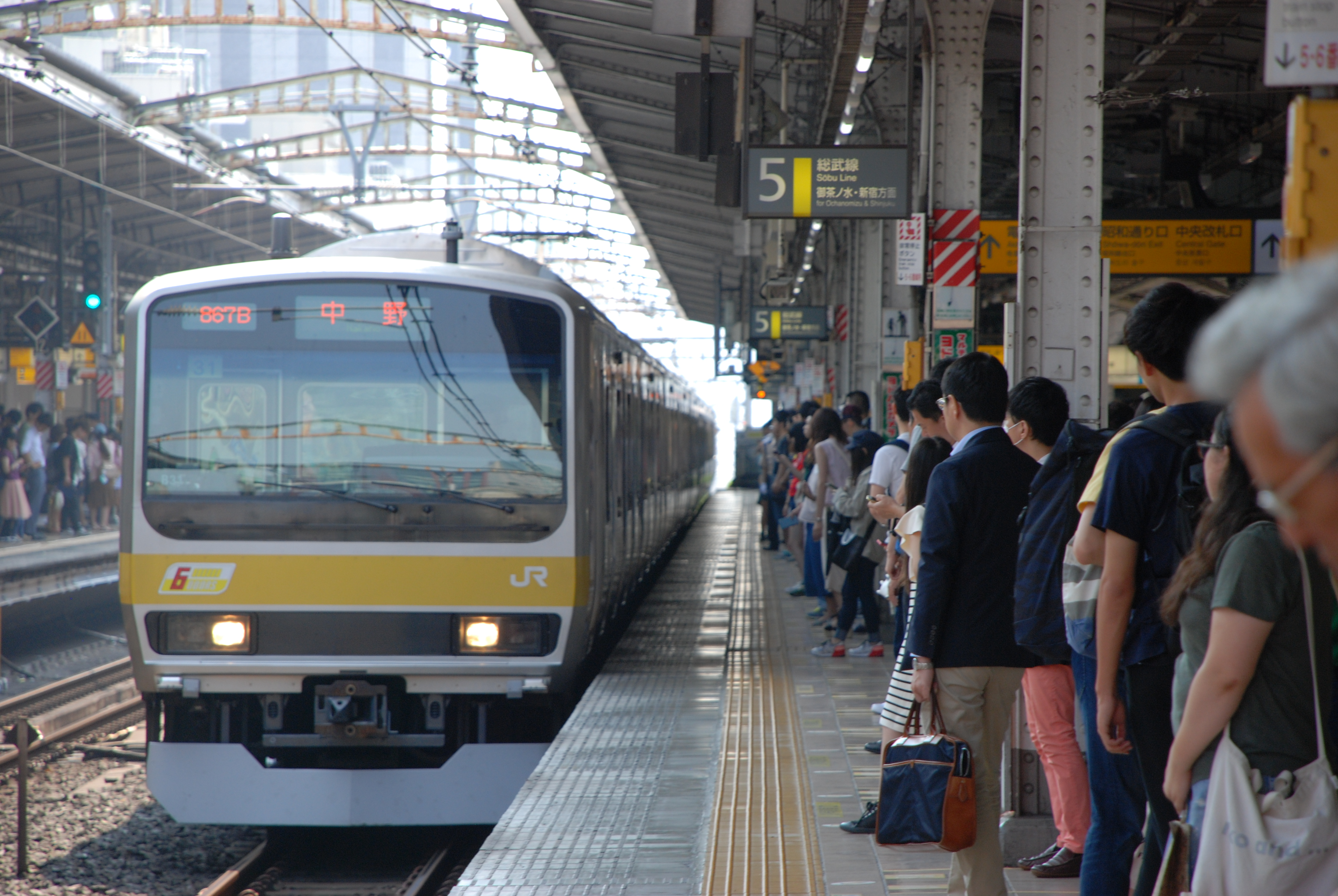 日本の首都圏の鉄道、等